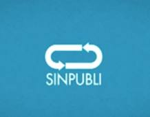 Logo de "Sin Publi", TVE